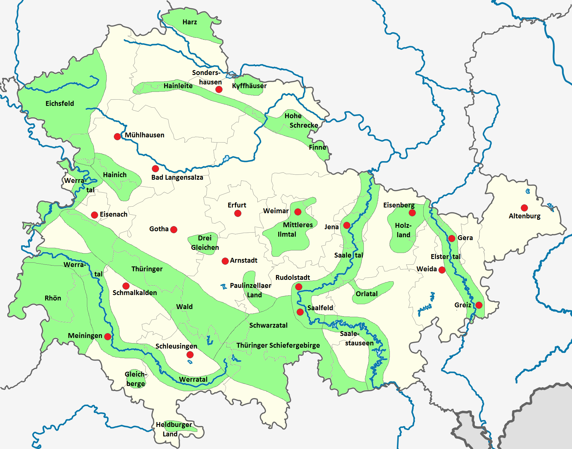 Einige touristisch interessante Städte und Regionen in Thüringen.